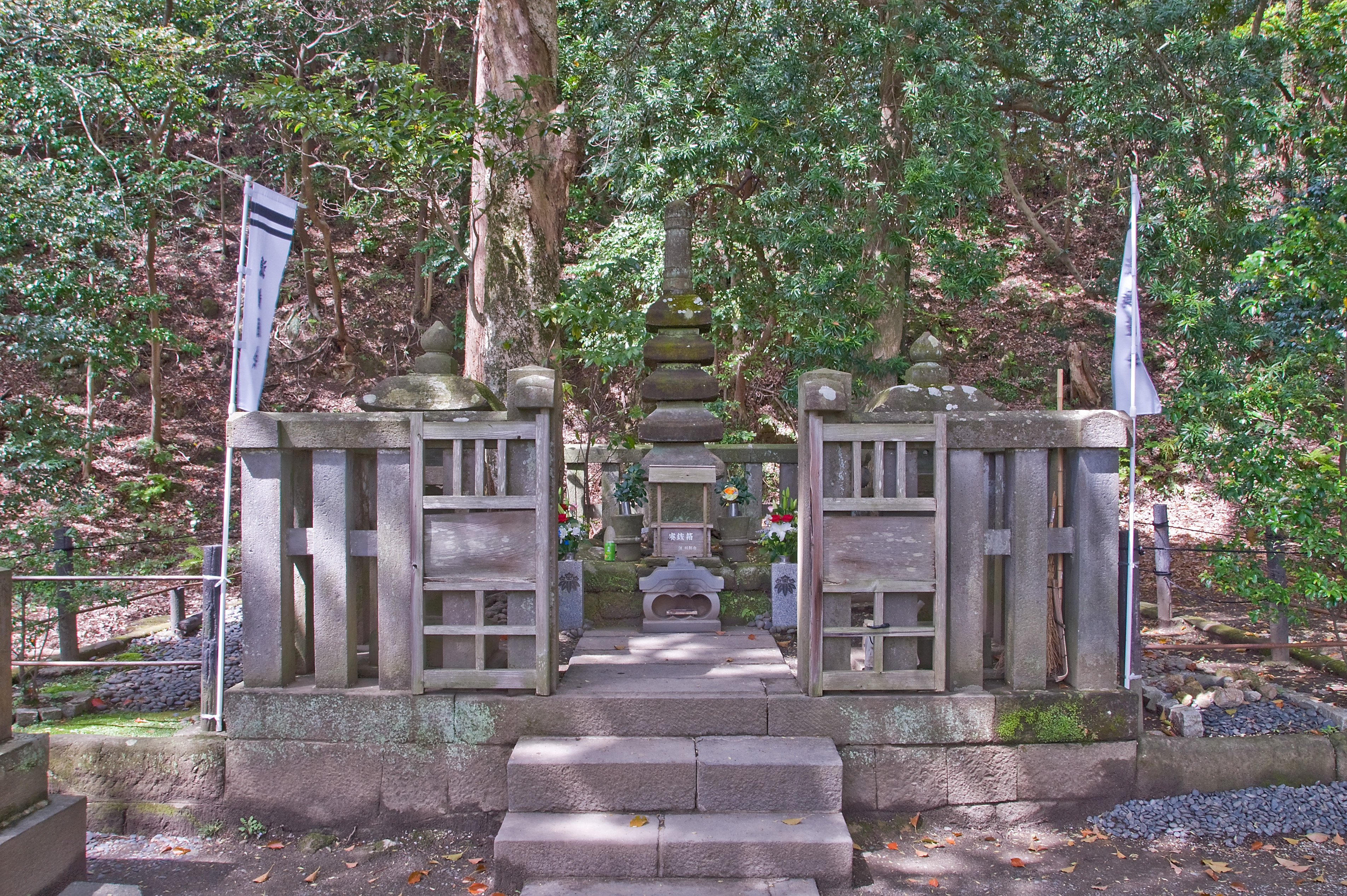 Minamoto no Yoritomo(源頼朝)'s grave in Kamakura